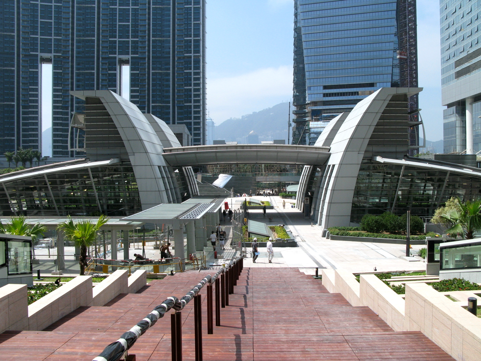 Union Square Garden